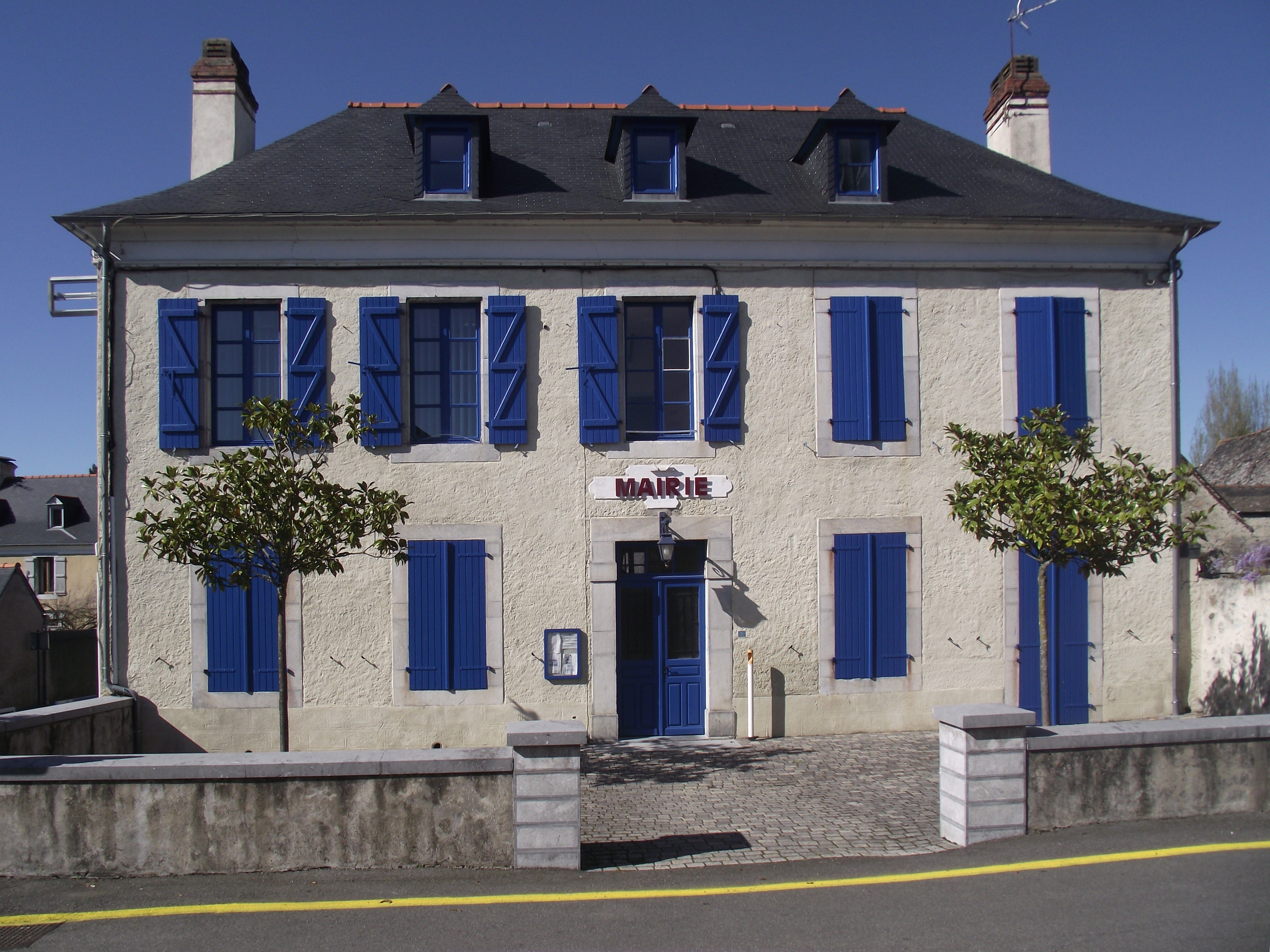 Mairie d'Adé (Hautes-Pyrénées, France)